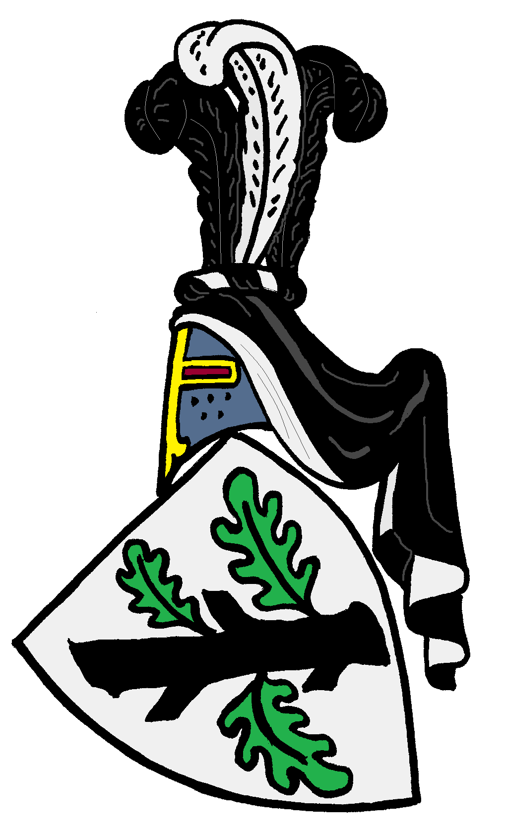 Stammwappen derer von der Dollen, altes ursprünglich altmärkisches Adelsgeschlecht